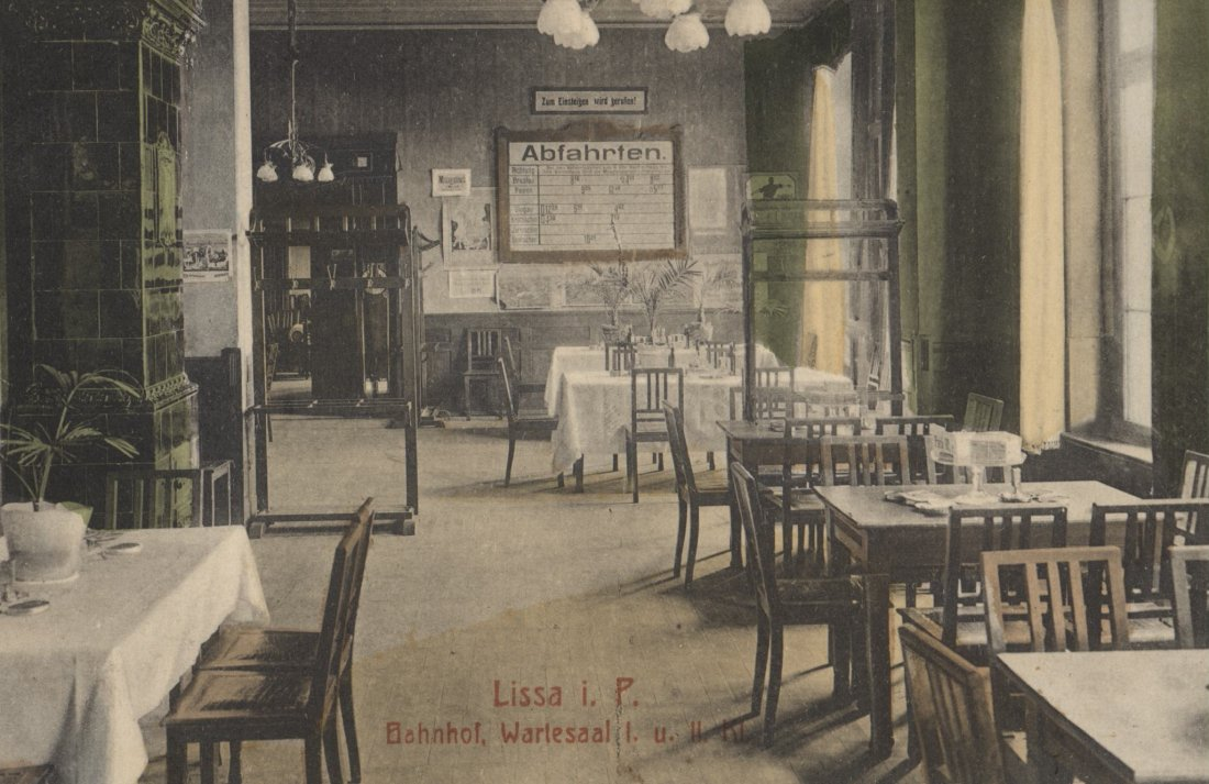 Po rozbudowie dokonanej w 1905 r. budynek dworca w Lesznie mieścił kilka poczekalni pasażerskich różnych klas oraz restaurację. Wnętrze dworca przed 1918 r. (pocztówka koloryzowana w zbiorach Archiwum Państwowego w Lesznie)